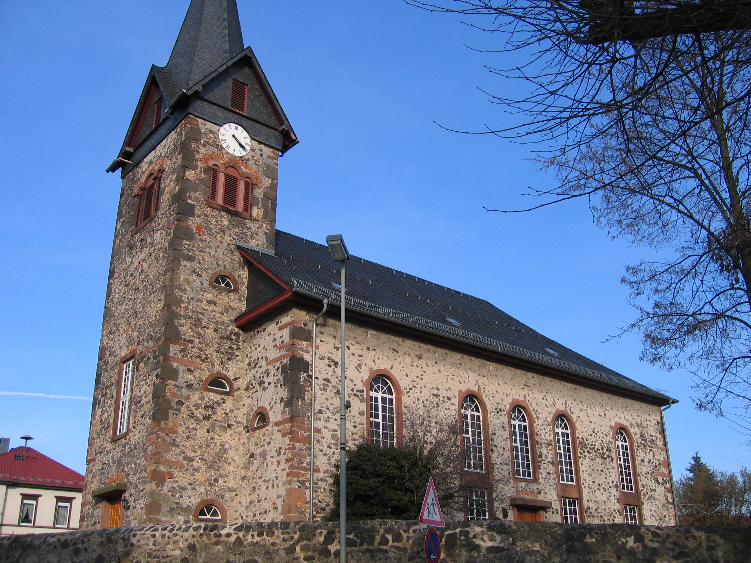 Evangelisch-lutherische Kirche in Melbach. Blickrichtung Norden (also Südseite der Kirche).